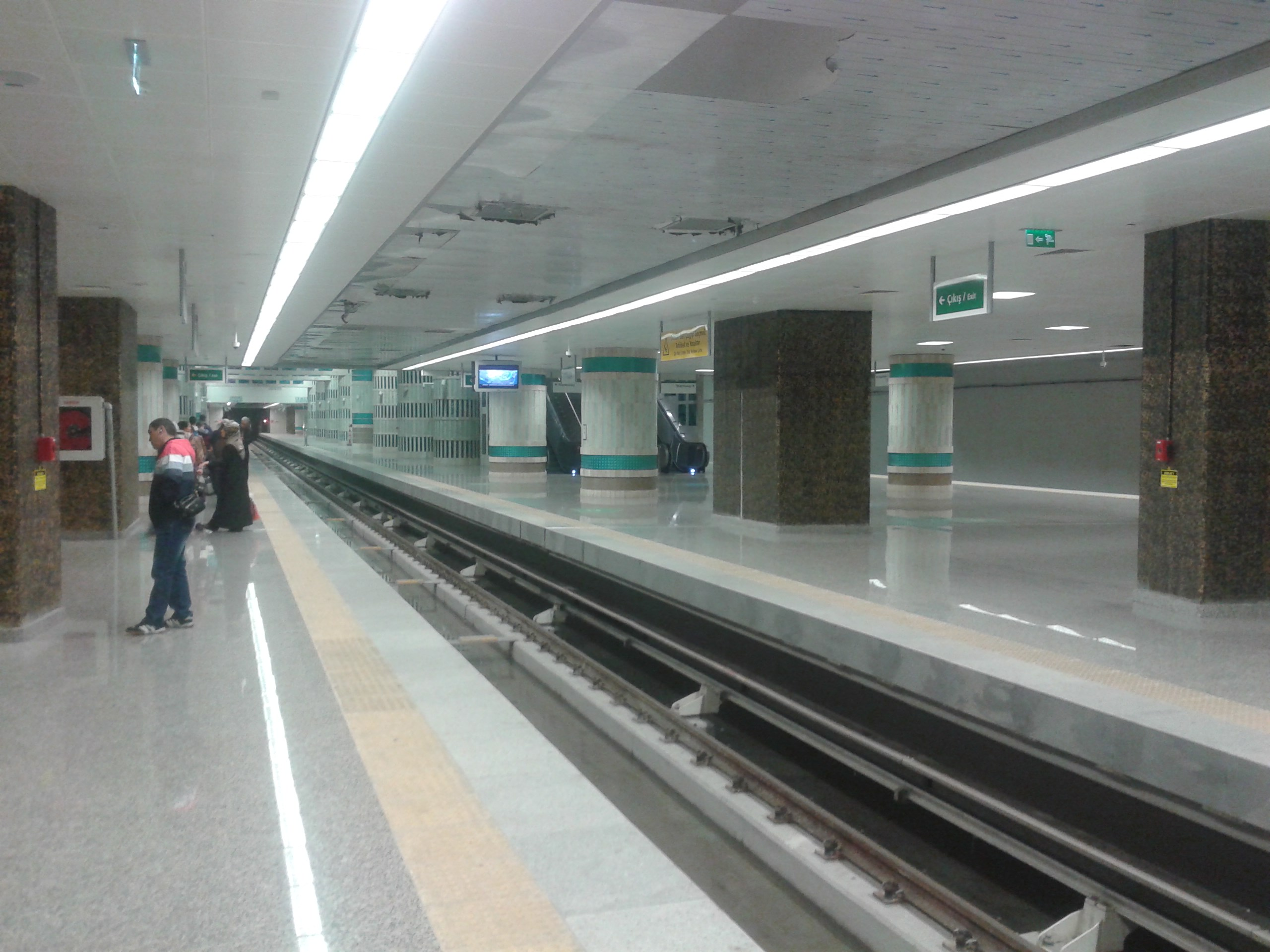 Yenikapı İstasyonu